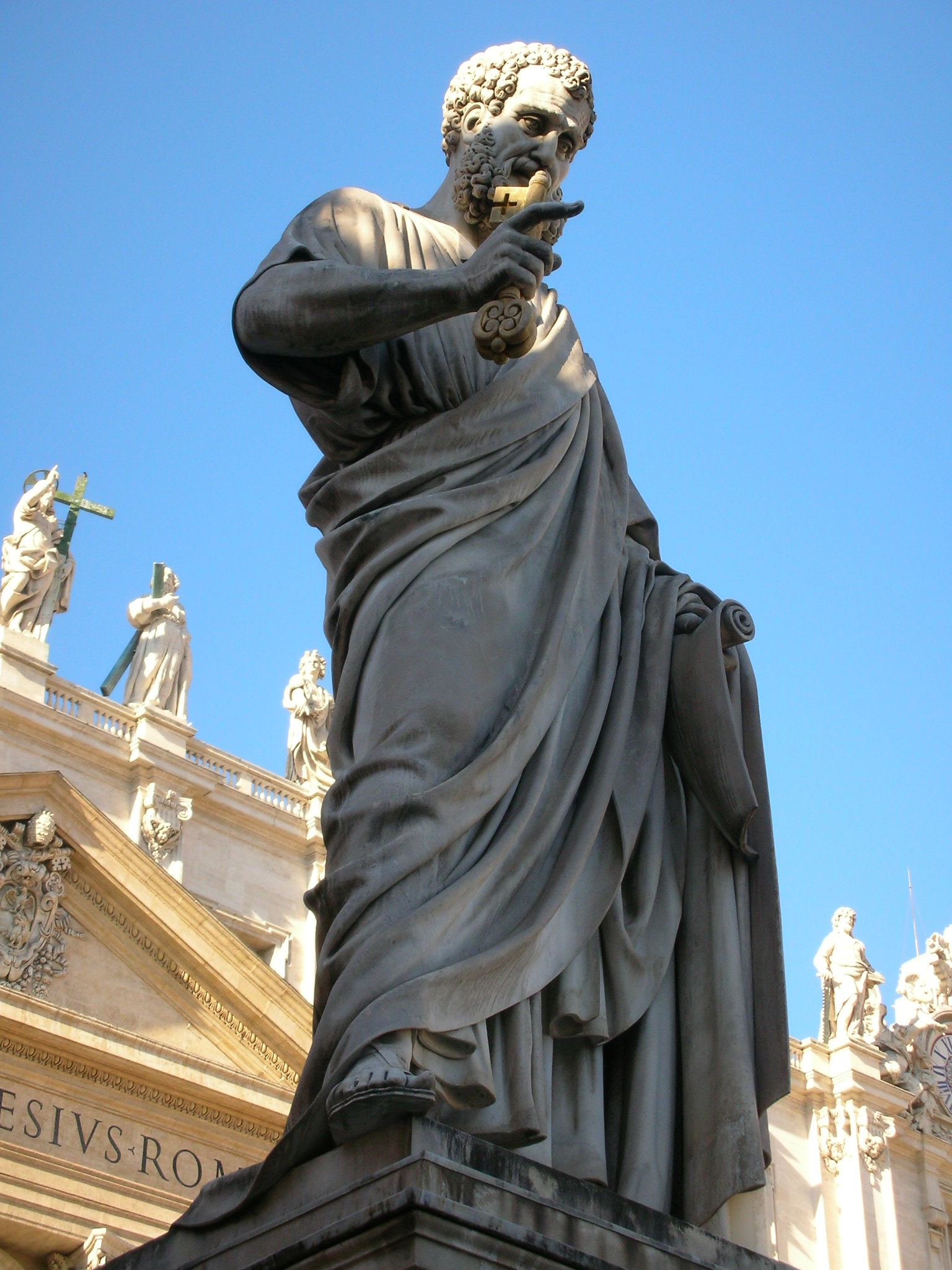 Statua di San Pietro in Piazza San Pietro (Roma)